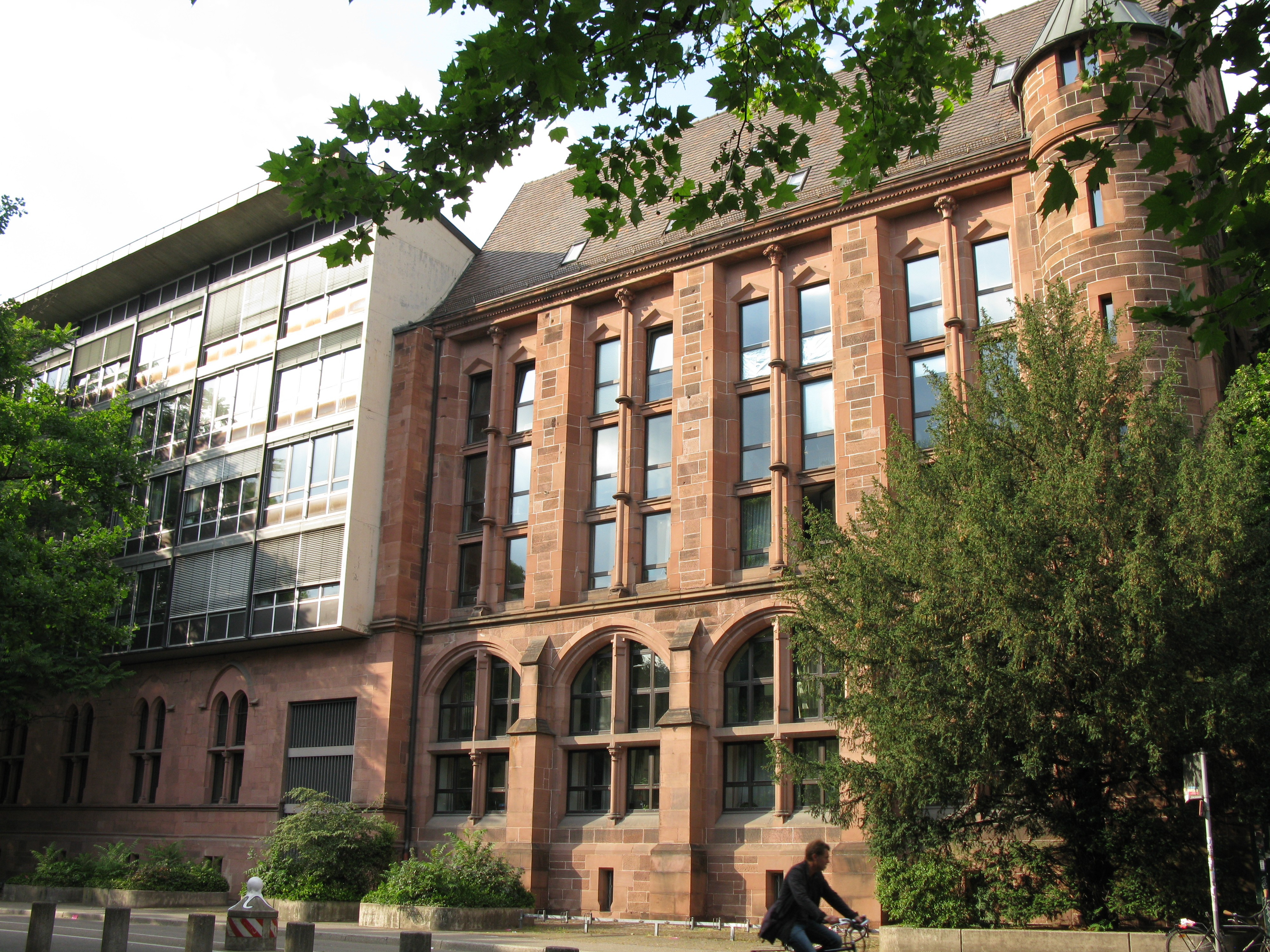 Kollegiengebäude IV der Uni Freiburg (als Universitätsbibliothek erbaut)